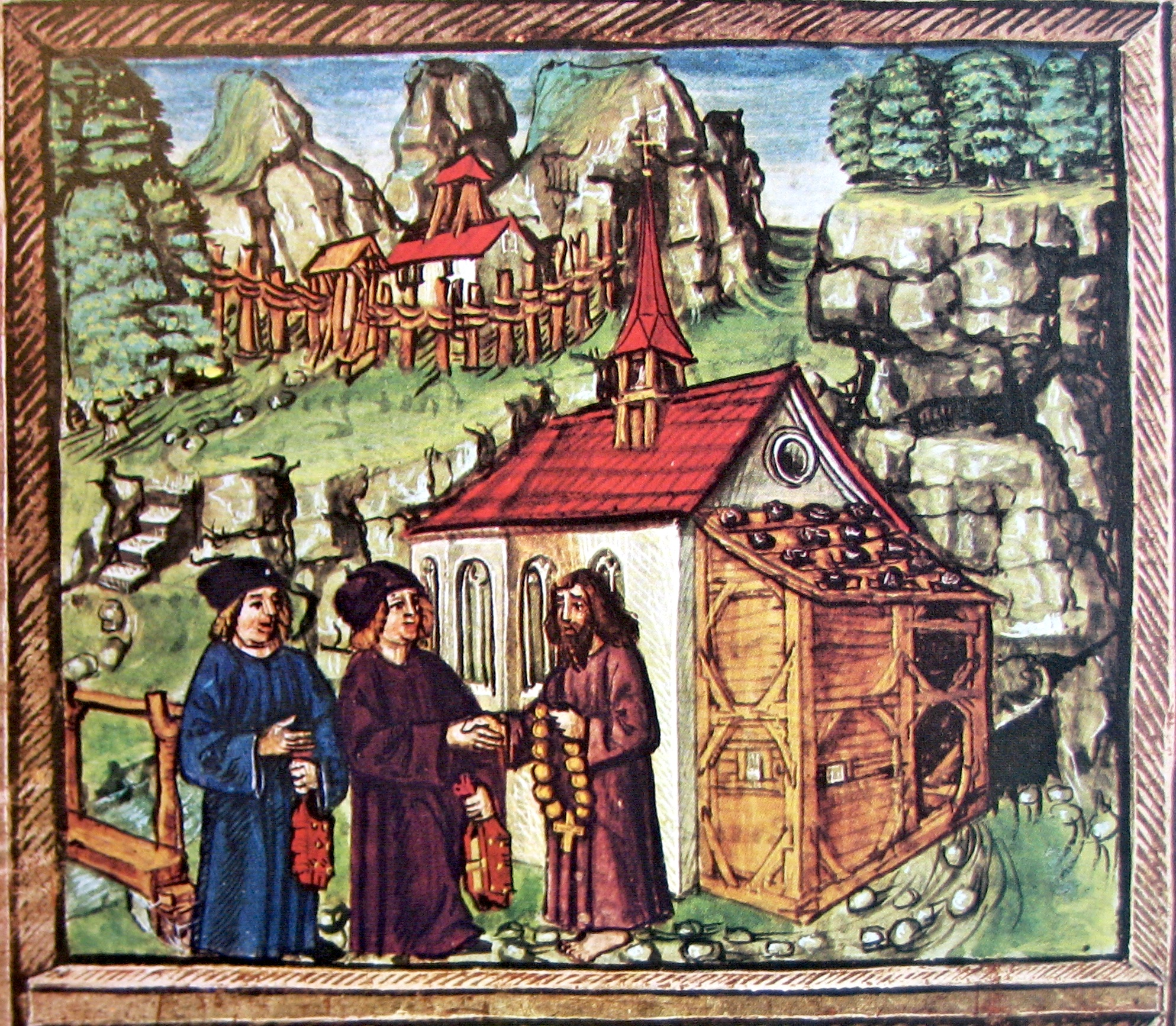 Der Stanser Pfarrer Heini bittet Niklaus von Flüe um Vermittlung zwischen Städtekantonen und Länderorten (Stanser Verkommnis 1481) Darstellung in der Luzerner Chronik von Diebold Schilling